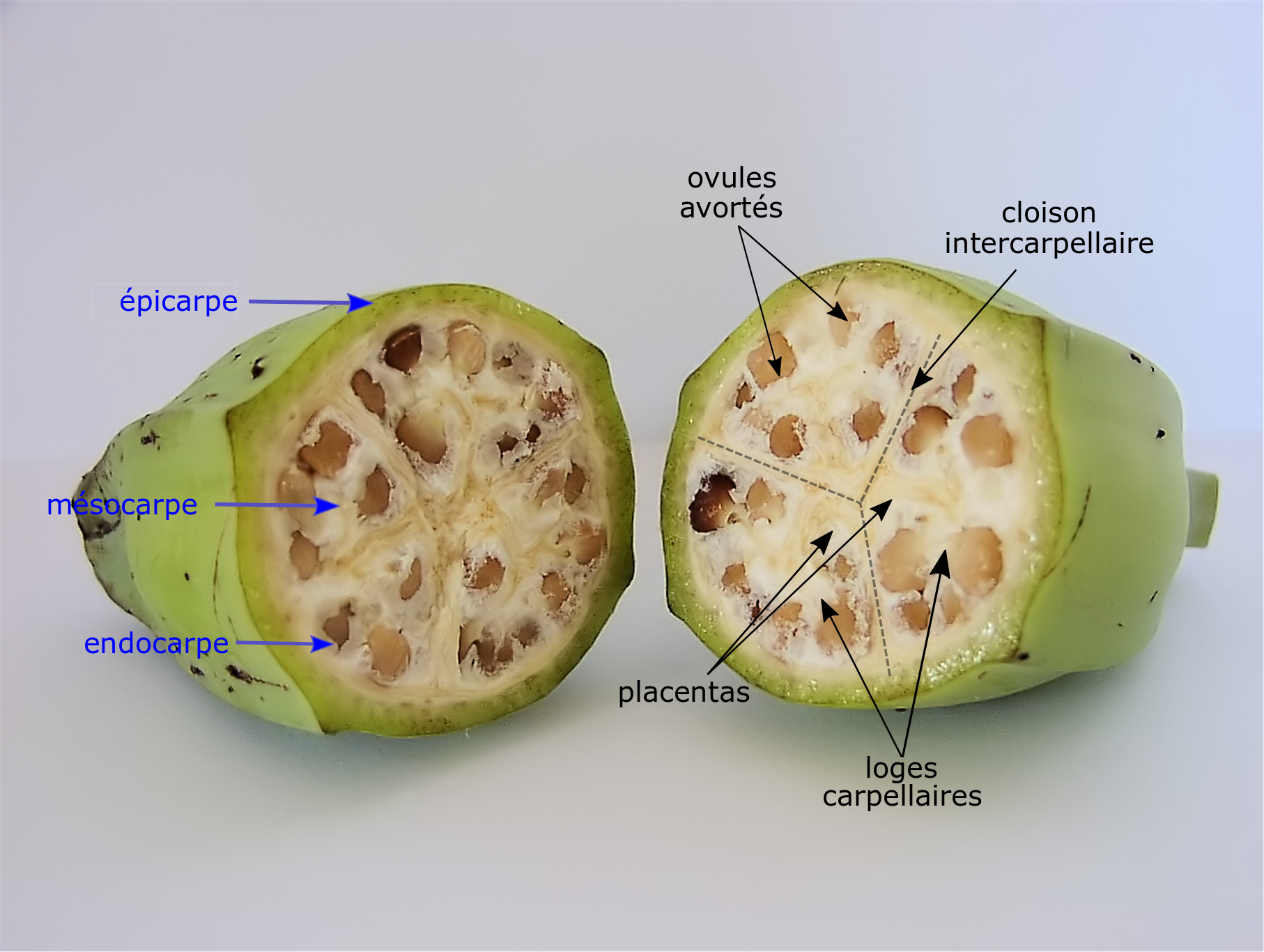 Coupe transversale d'une banane montrant que ce fruit est une baie charnue allongée comportant trois rangées d’ovules avortés et trois zones de suture (cloisons intercapellaires) qui délimitent les trois loges carpellaires de l’ovaire, opposant une moindre résistance lorsque l’on “pèle” la banane.